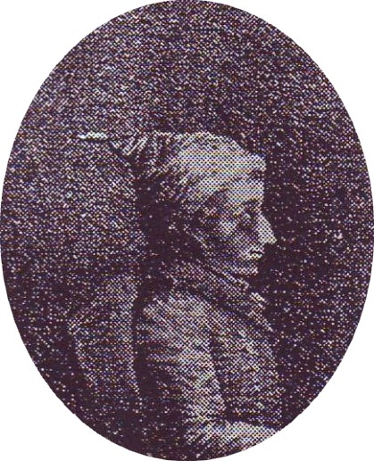 František Xaver Partsch (1760 - 1822), Český hudební skladatel.